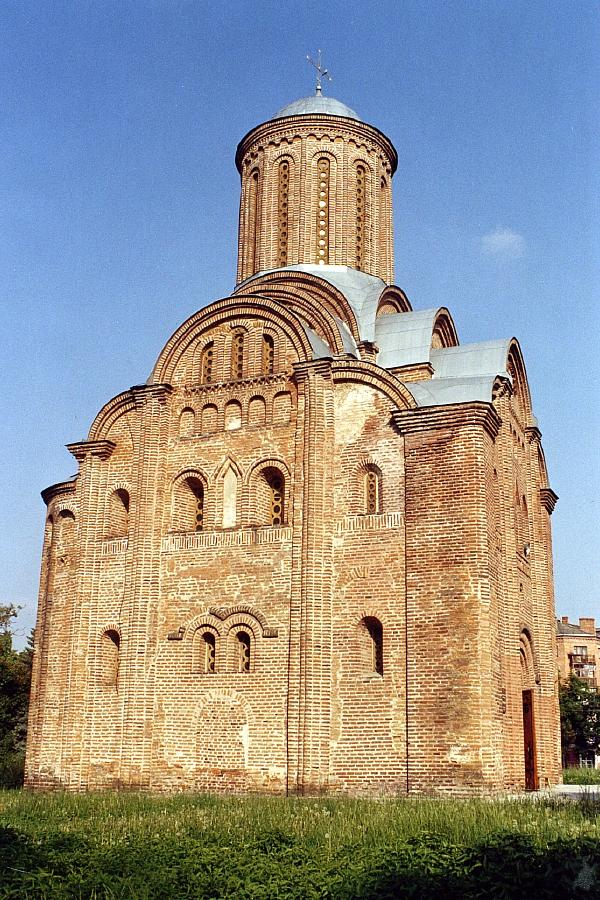 Pyatnytska Church in Chernihiv, Ukraine